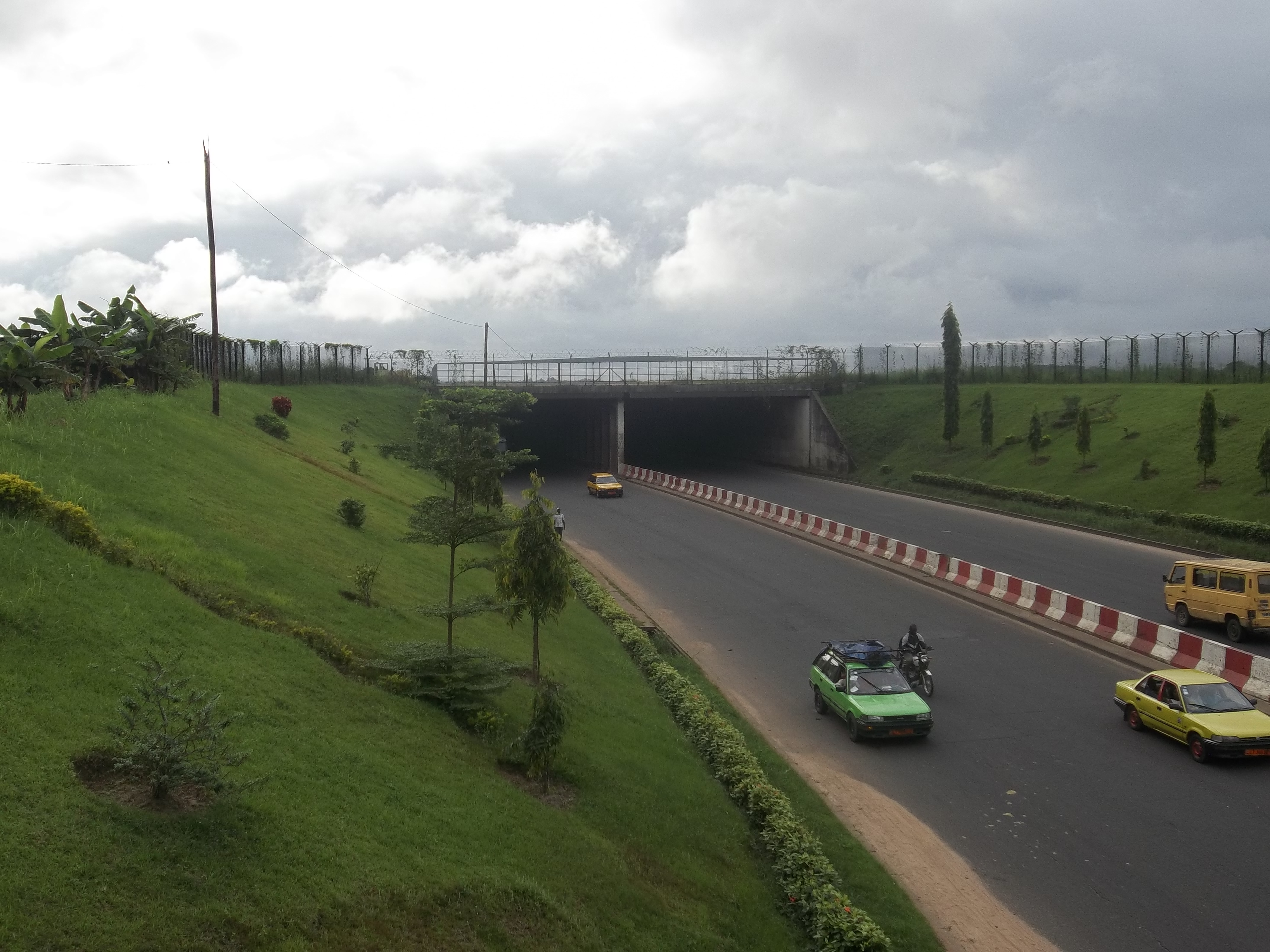 Tunel situé à l'aéroport international de Douala